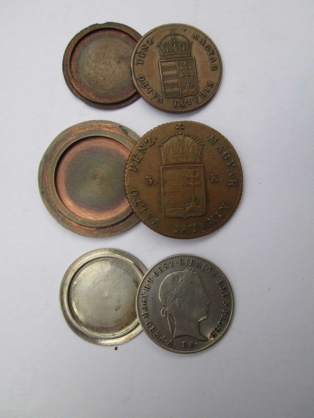 Csavaros 1, 3 és 20 krajcár.